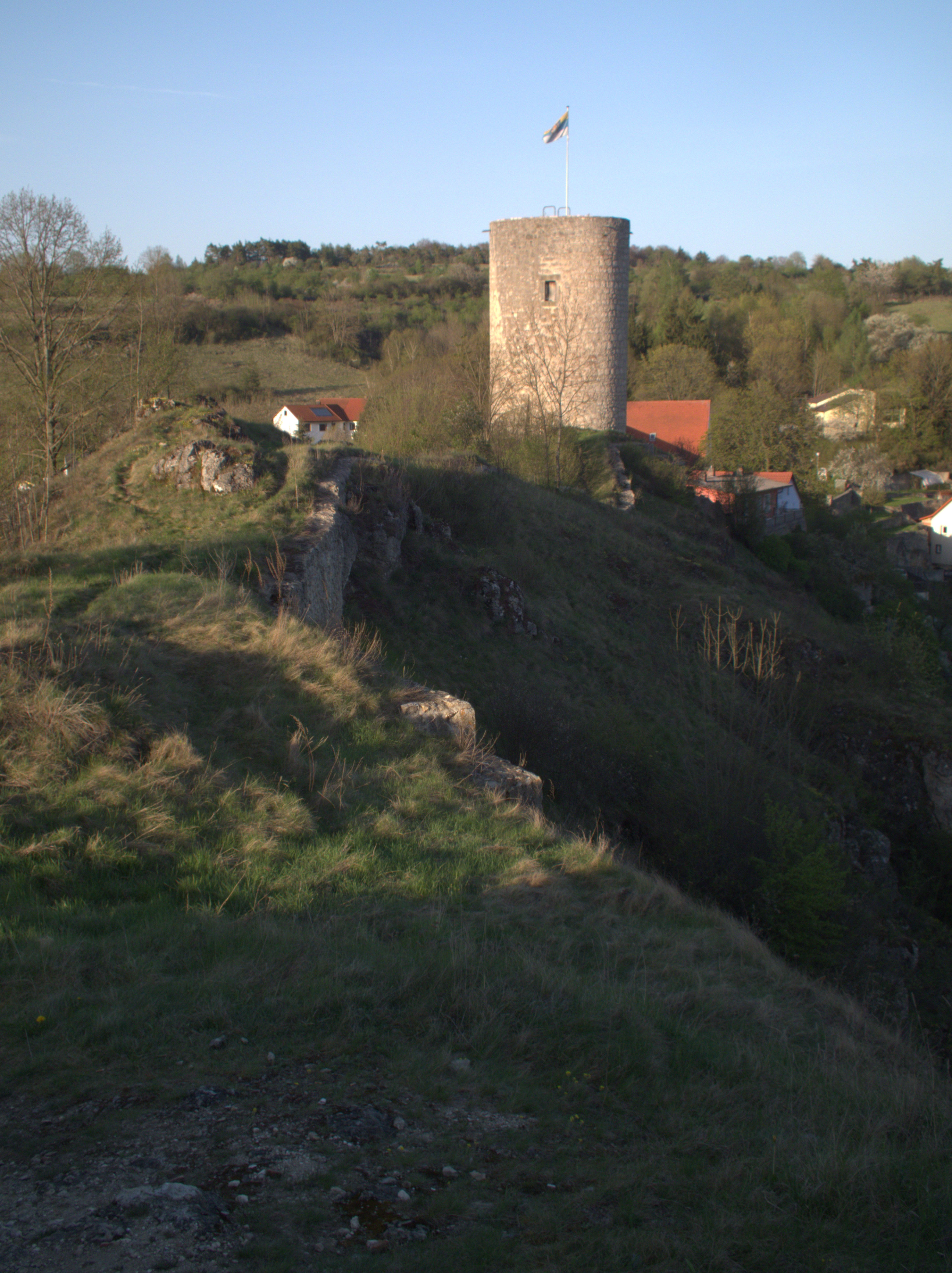 Burg Hohenfels in der Oberpfalz